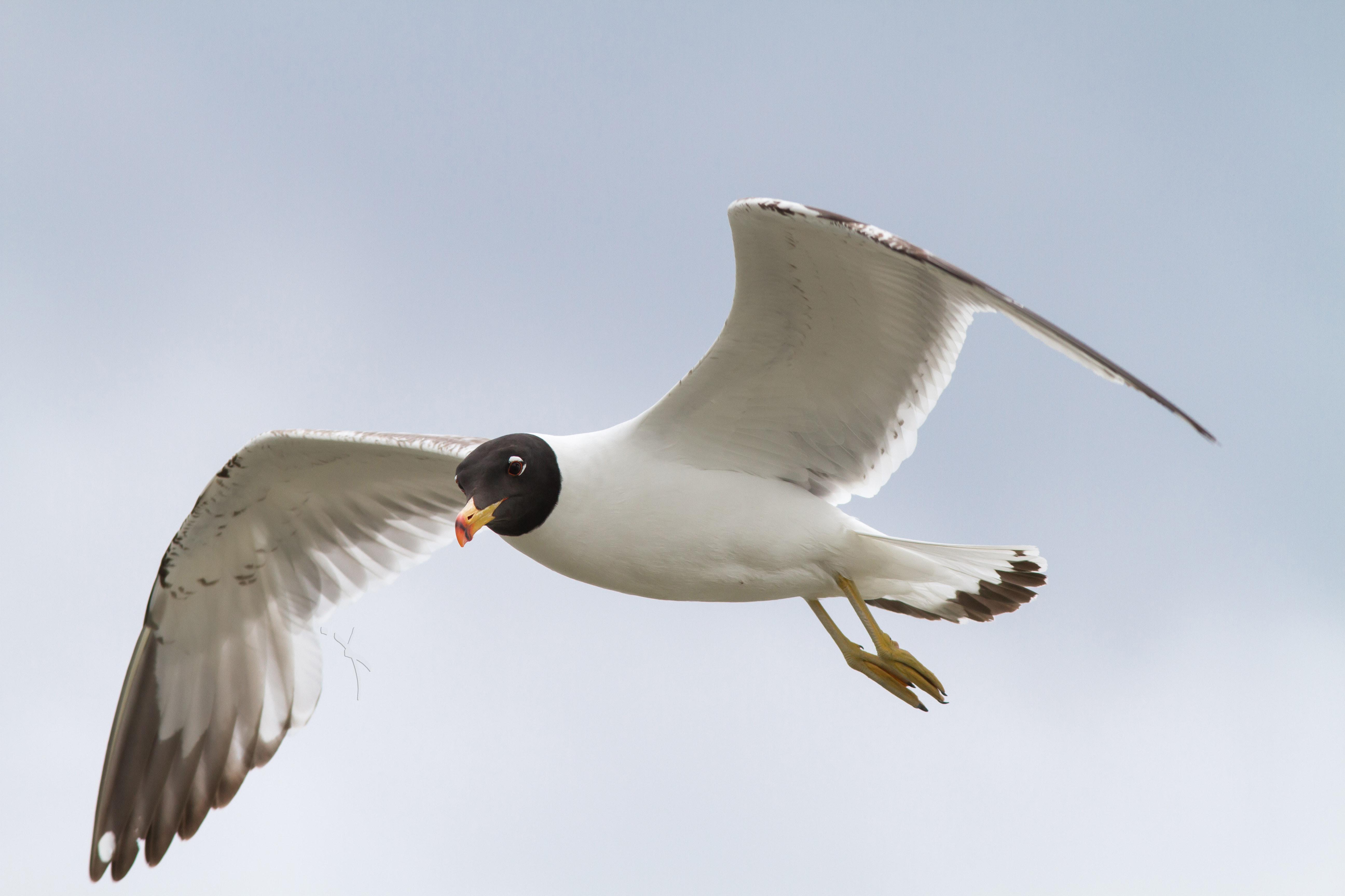 Racek very